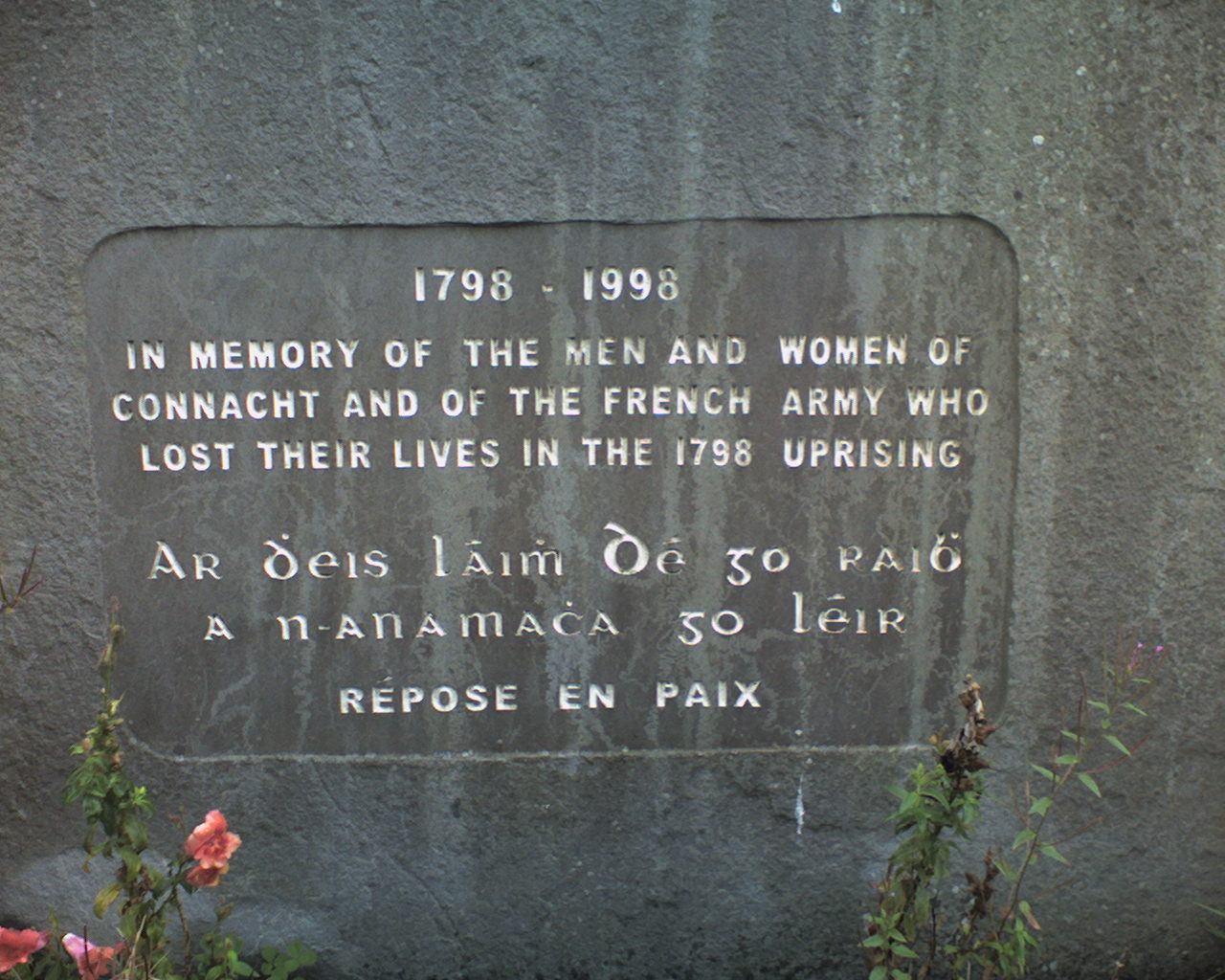 1798 Memorial at Killala